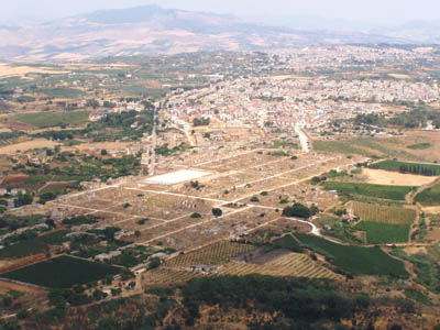 Panoramica_paese_3